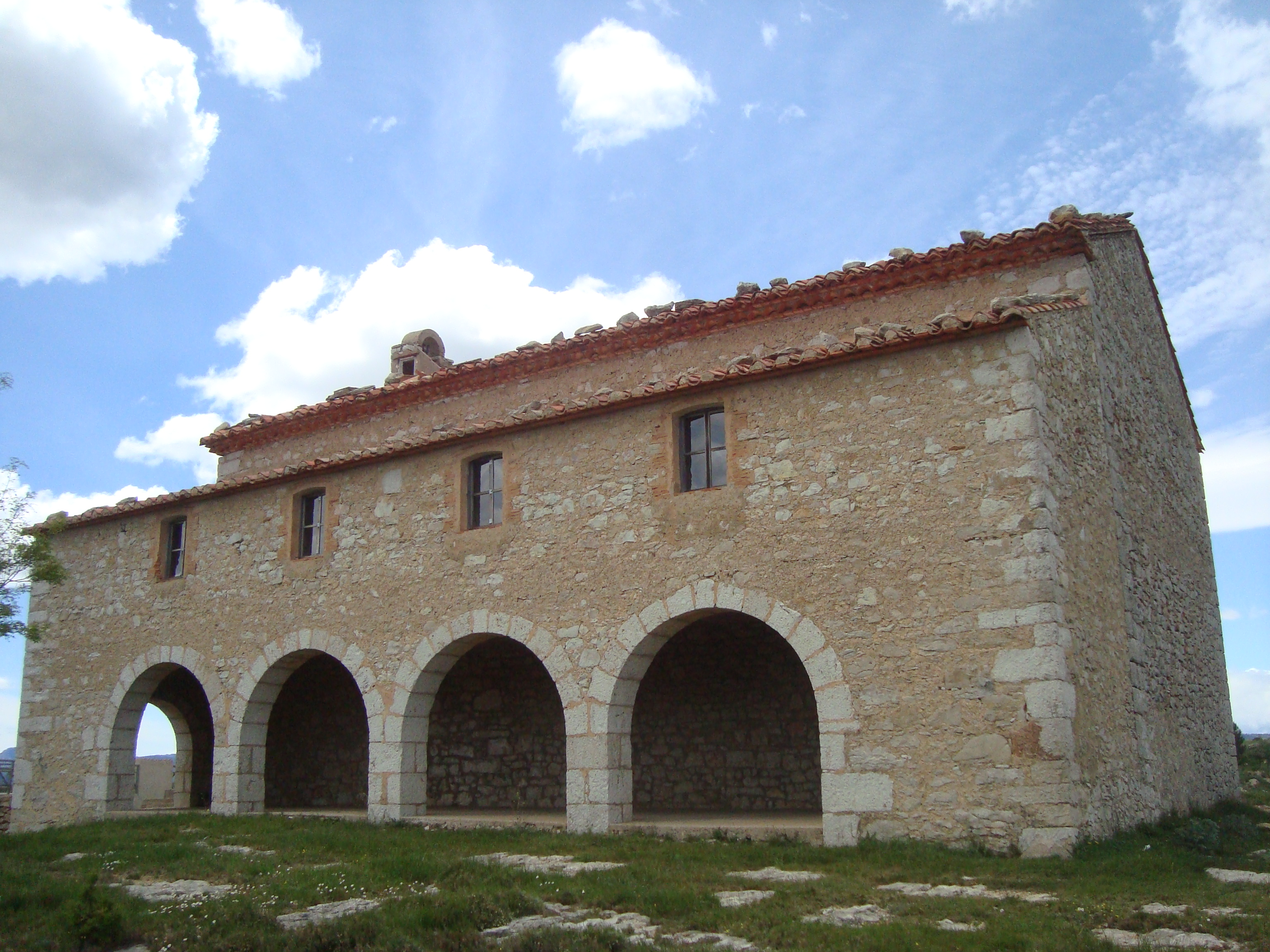 Ermita de Sant Cristòfol (Culla) 02.051-008.